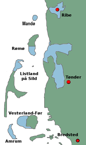 Kongerigske Enklaver i Sønderjylland (blå)